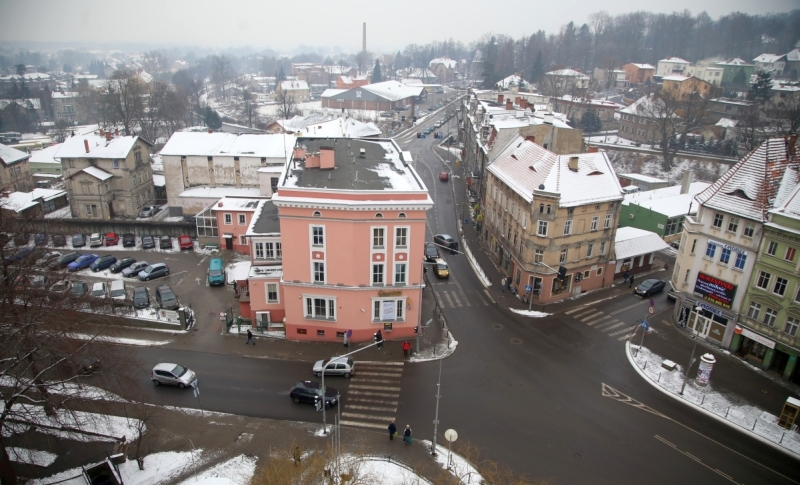 Centrum miasta. Widok z Baszty Brackiej